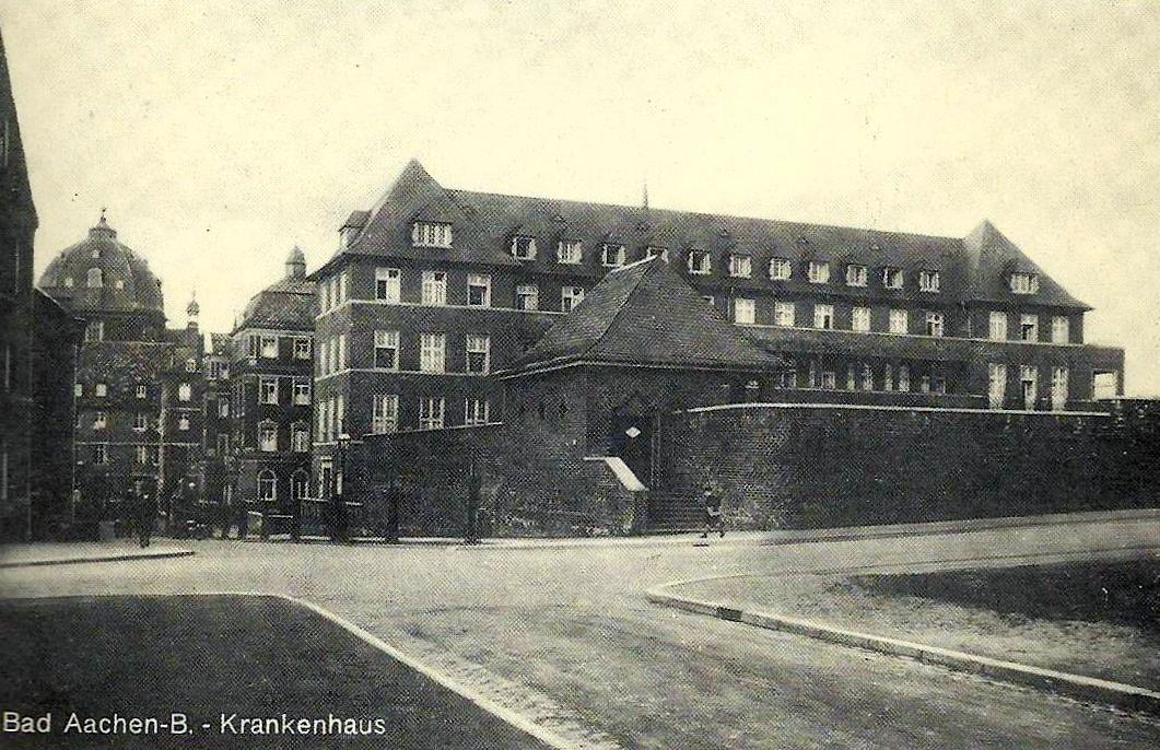 Ansicht Marienhospital Aachen-Burtscheid im Jahr 1920